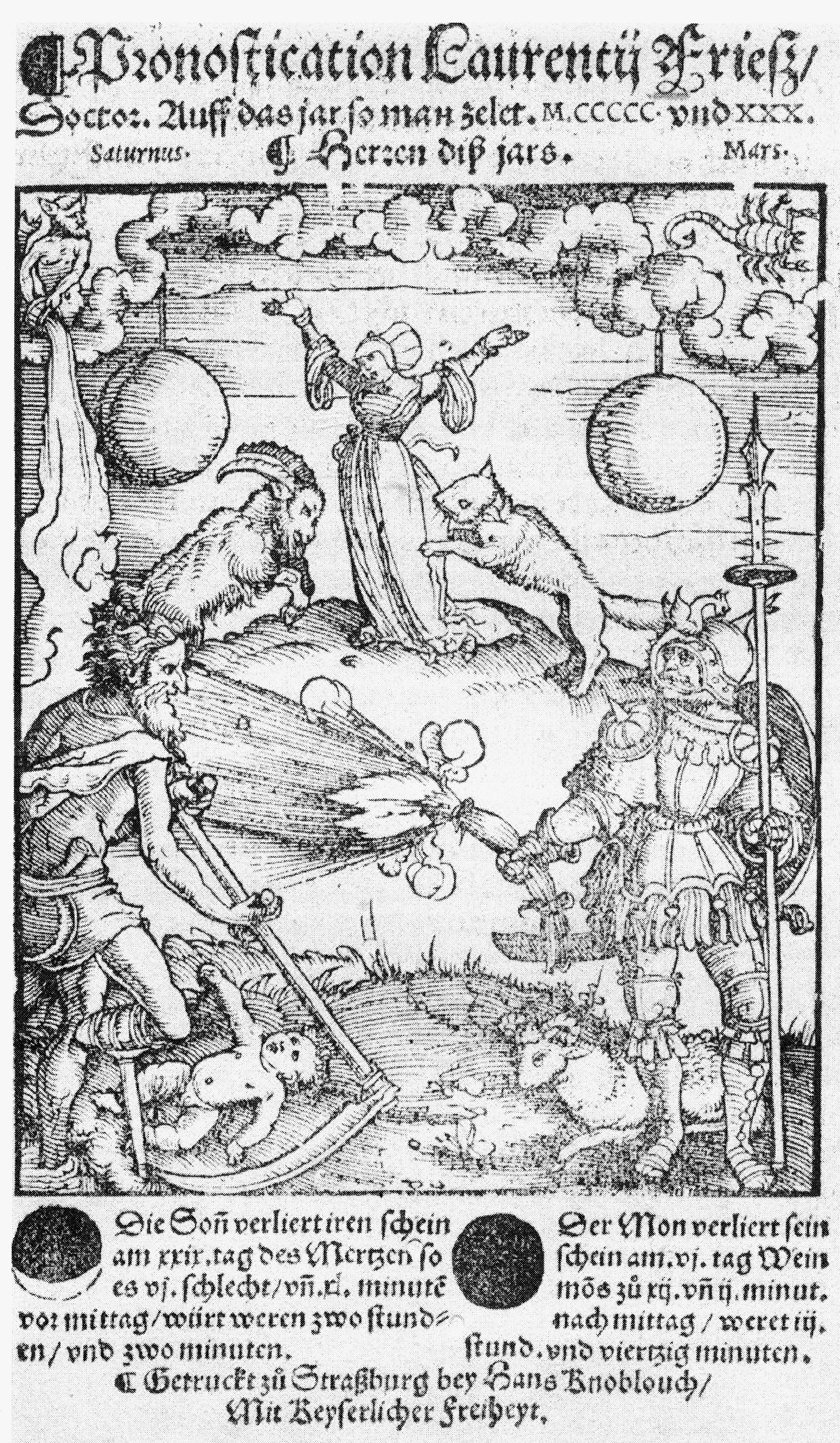 Titelbild. Prognostication auf 1530.